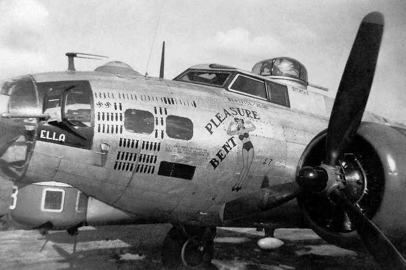 Boeing B-17G-75-BO Fortress 43-37981 "Pleasure Bent" 487bg 838bs